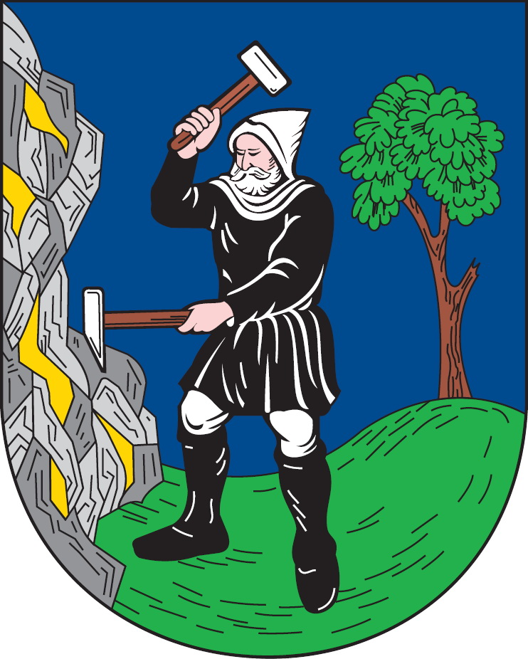 Znak města Zlaté Hory